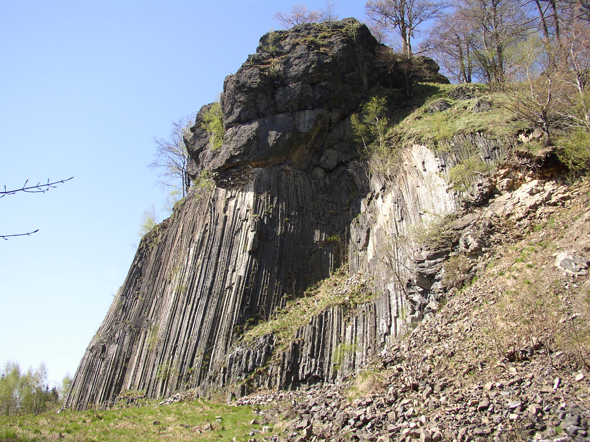 Zlatý vrch, sloupcovitá odlučnost čediče